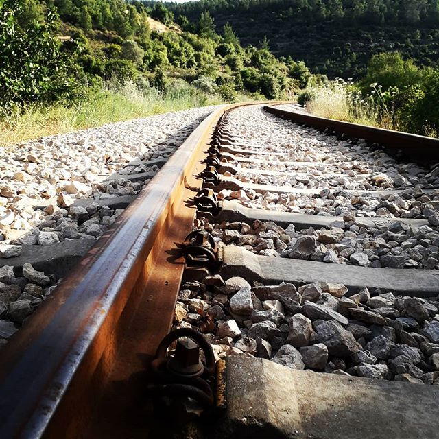 إحدى محطات سكة الحديد التي تمر في بتير والتي أنشأها العثمانيين عام 1890 وتصل بين يافا والقدس، أول خط سكة حديد في فلسطين وفي الوطن العربي